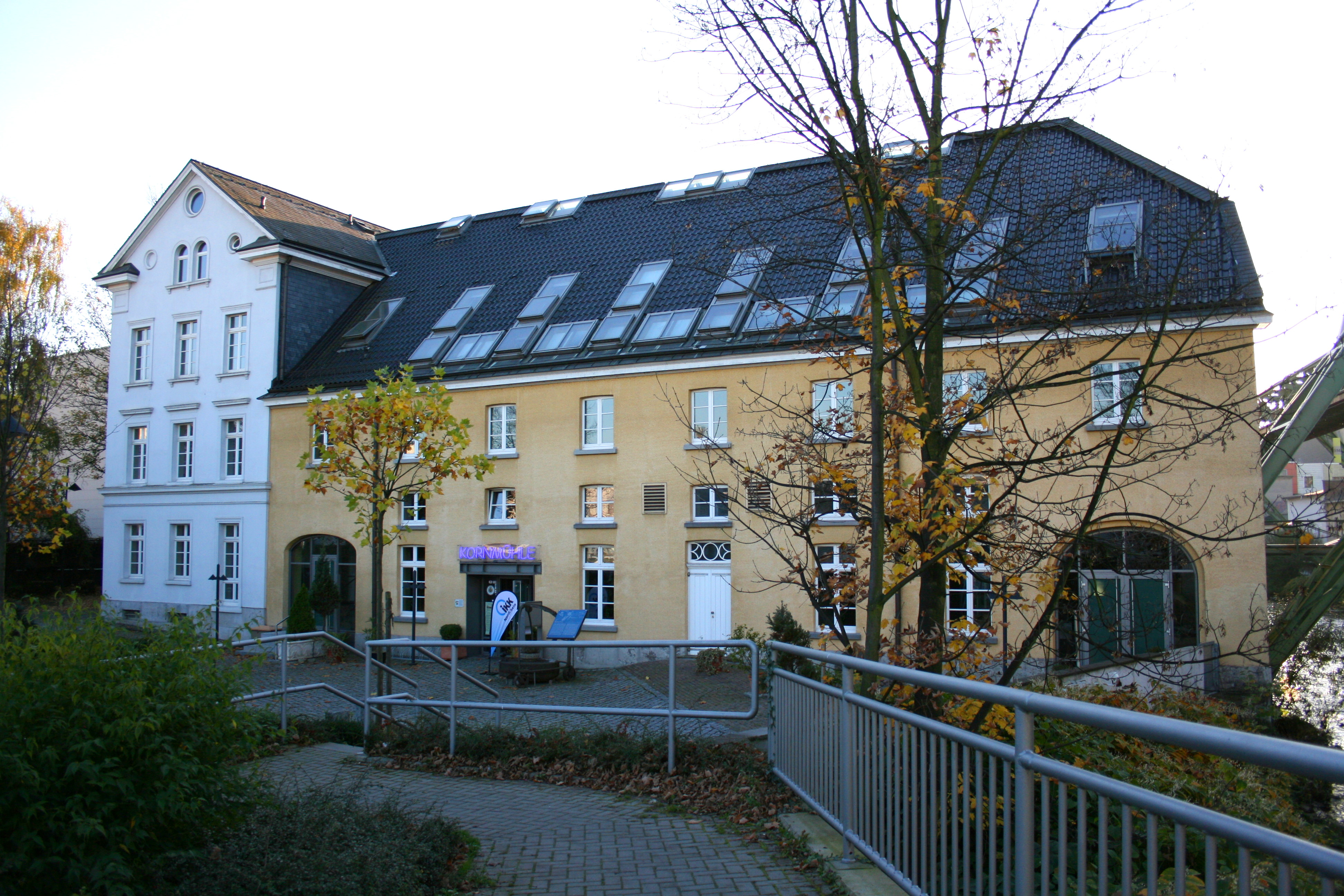 Cleff'sche Mühle in Wuppertal